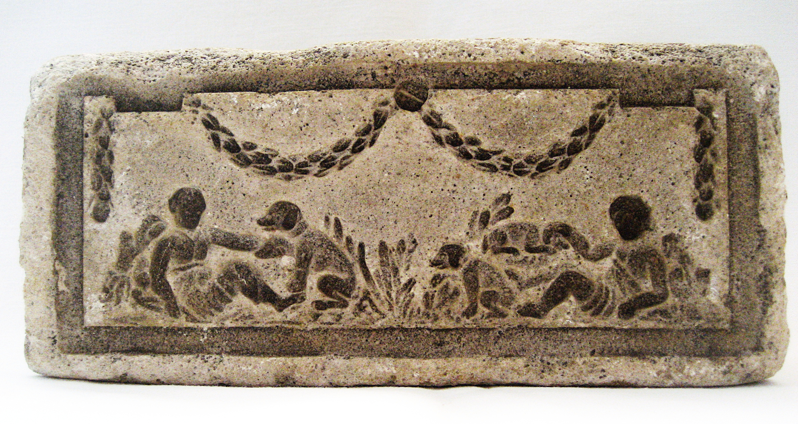 Model mit spielenden Kindern und Hunden aus St. Georgen / Rottal